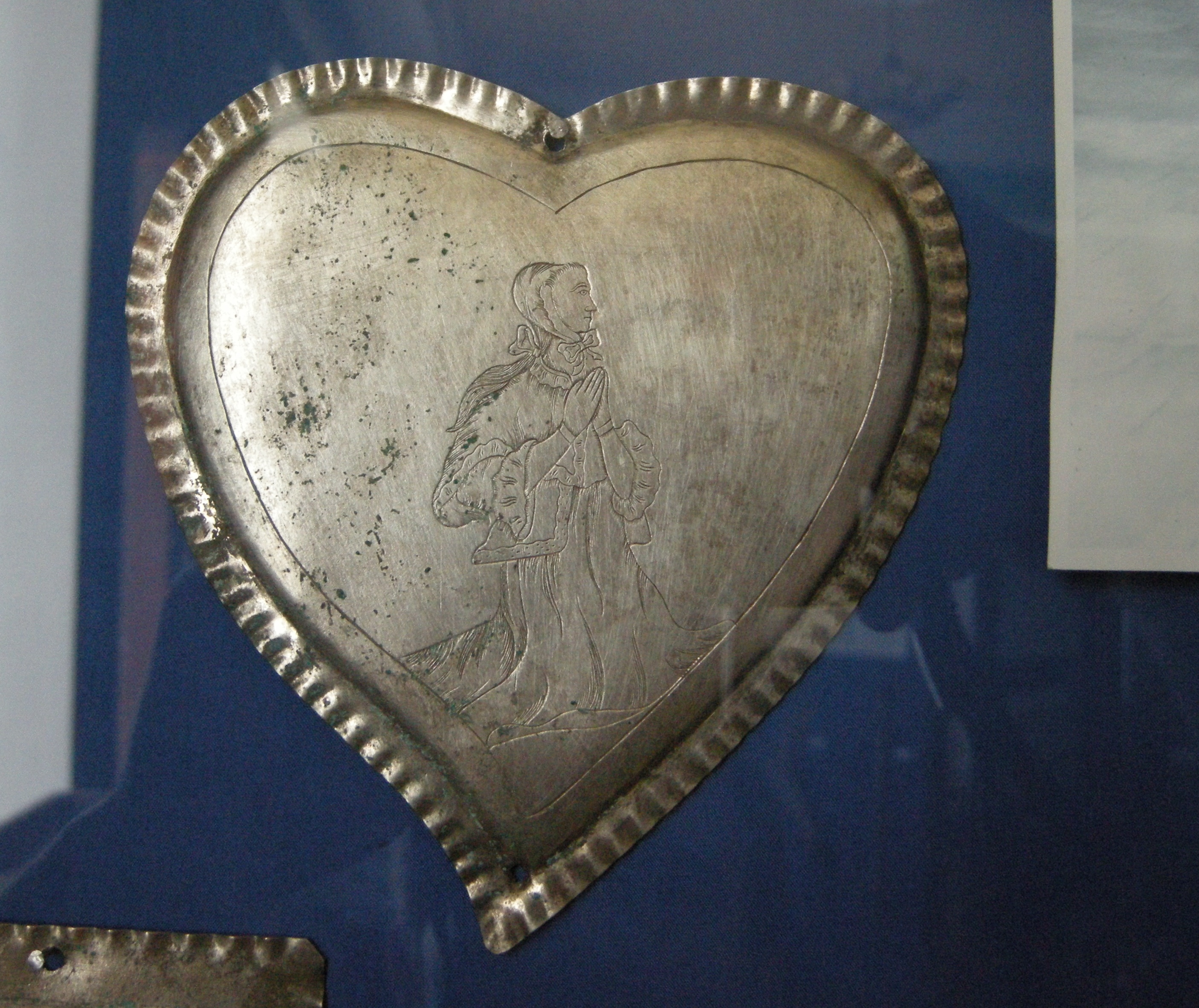 Вотива із колекції вотив, що походять з монастиря Бернардинів у Заславі. Ізяславський районний історико-краєзнавчий музей, стала експозиція.